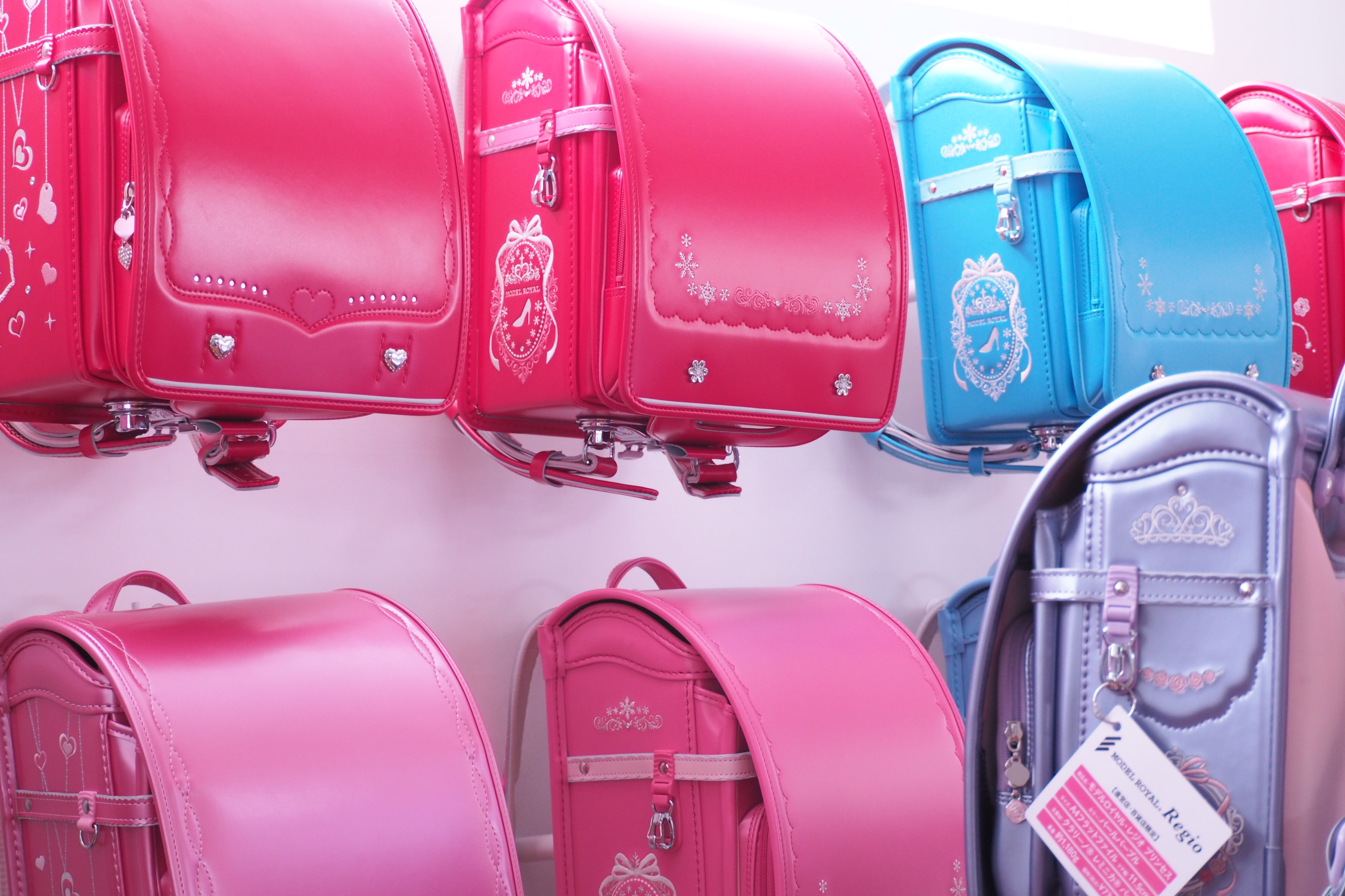 セイバン 天使のはねのランドセル写真。2018年4月4日撮影。東京都港区北青山